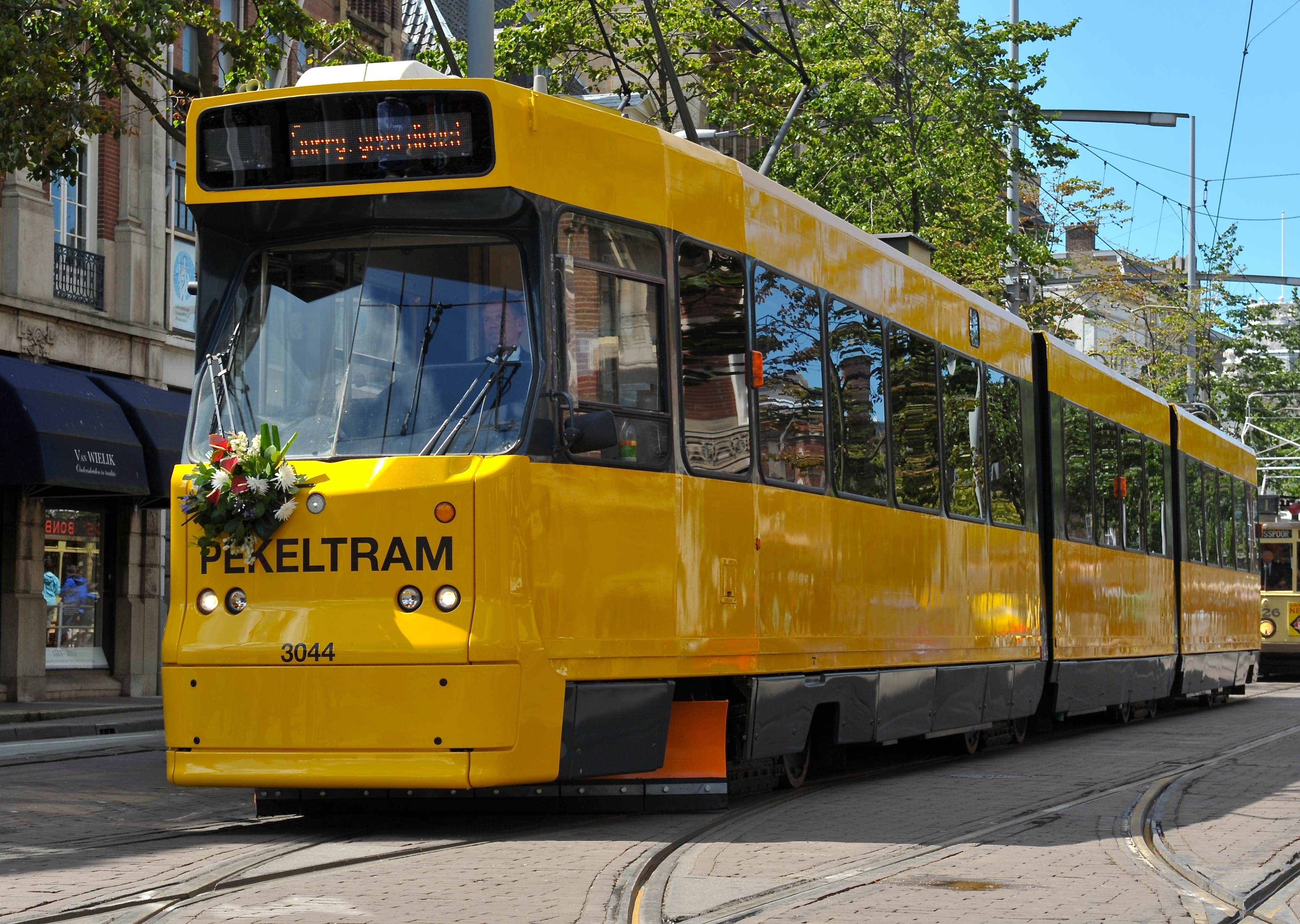 Pekel GTL 3044 (1981). Bij HTM Railmaterieel werden eind 2011 vier GTL trams omgebouwd tot pekeltrams. De wagens bleven dubbelgeleed en in iedere wagenbak werden twee pekeltanks geplaatst. In totaal kan een GTL pekeltram 10.000 liter pekel meenemen. De deuren bleven aanwezig, maar de niet benodigde deurpartijen werden vergrendeld. Ze zullen ook geschikt gemaakt worden om als instructietram te dienen, zodat ze het hele jaar door kunnen rijden. Bron